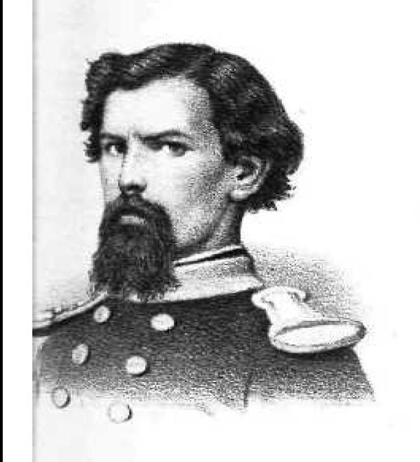 Griechischer Freiheitskämpfer, 19. Jahrhundert